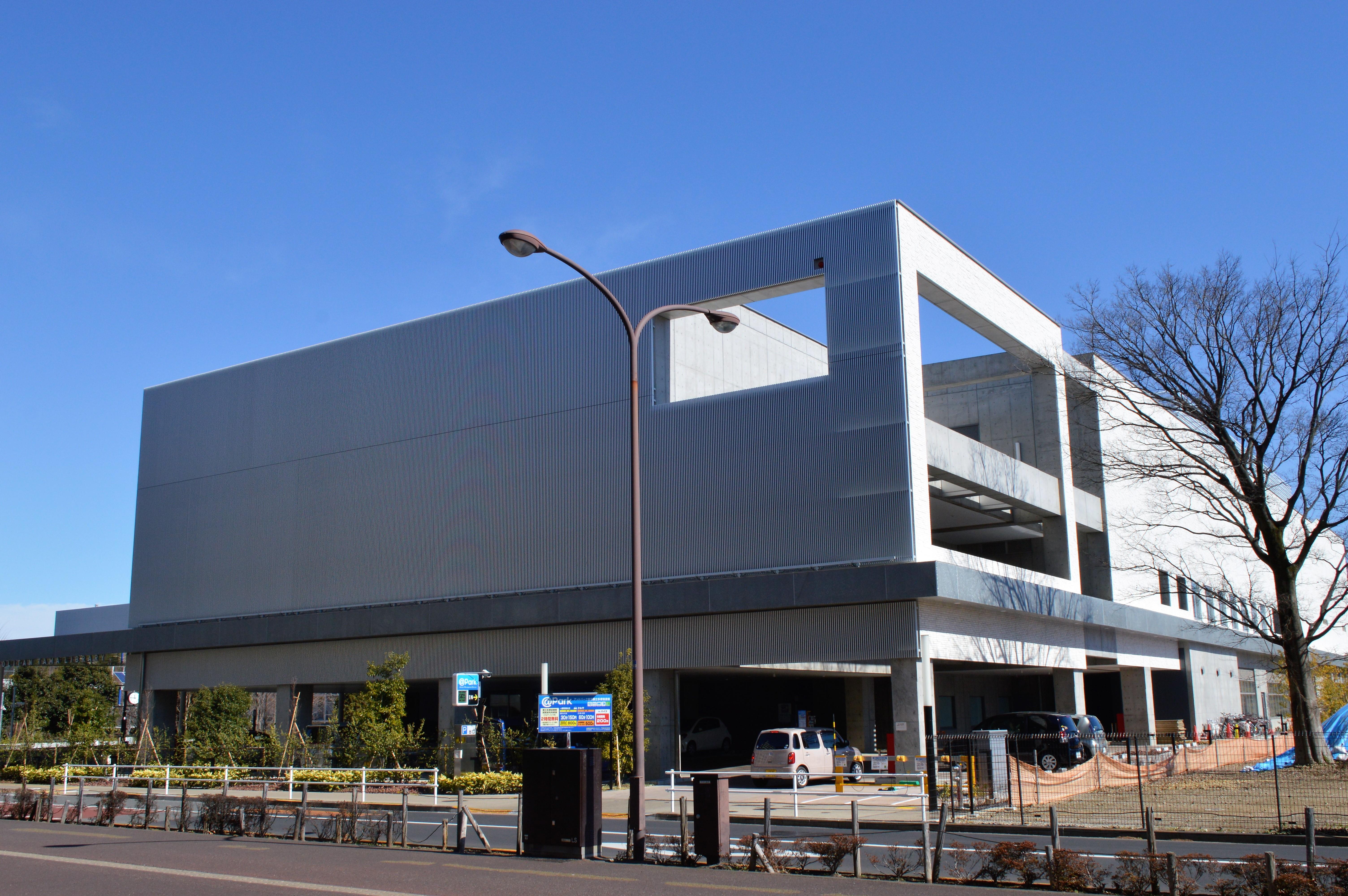 東京都国分寺市の東京都立多摩図書館。2017年1月29日に当地に移転開館した。